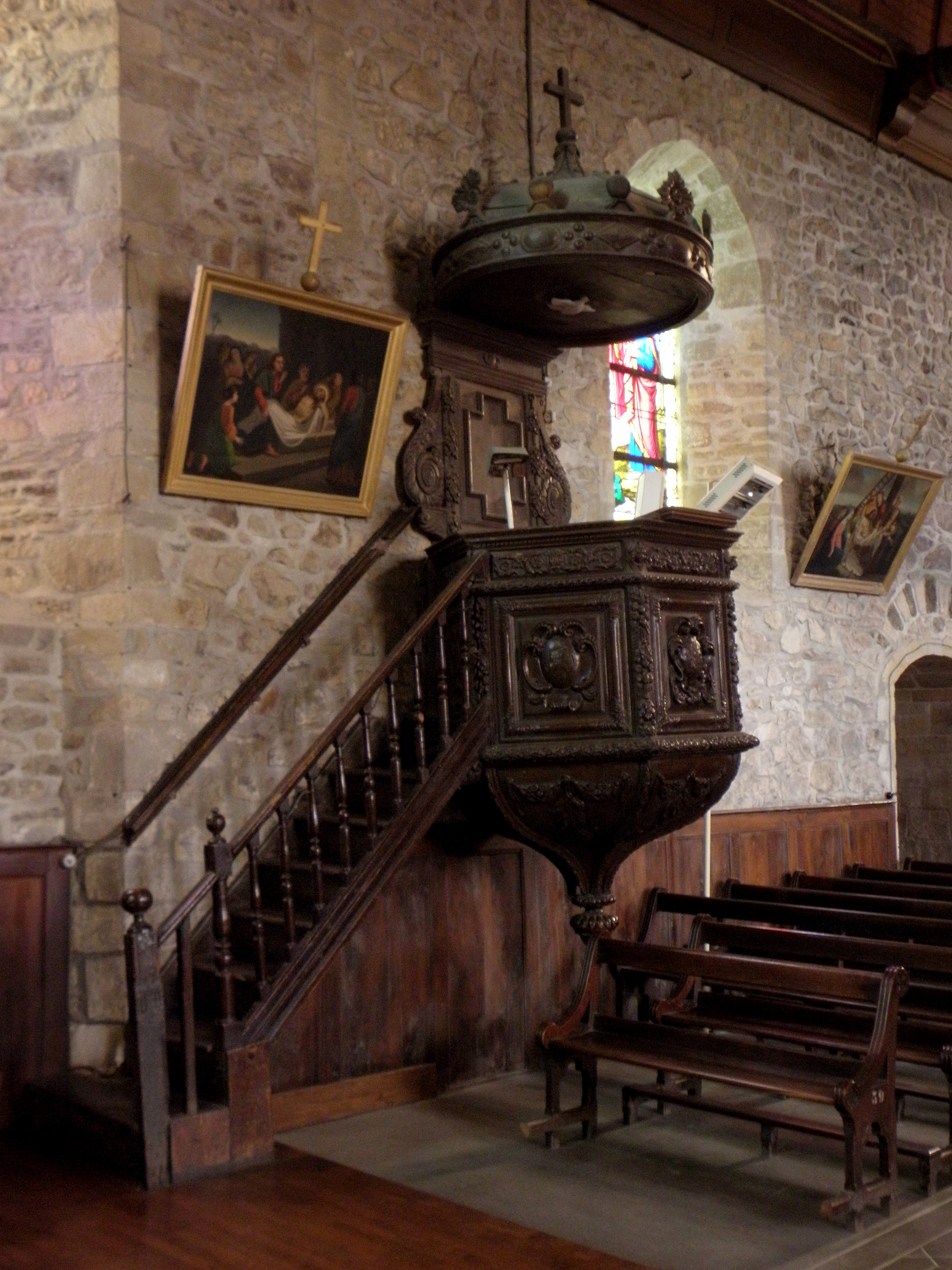 Chaire à prêcher de l'église Saint-Pierre de Visseiche (35).